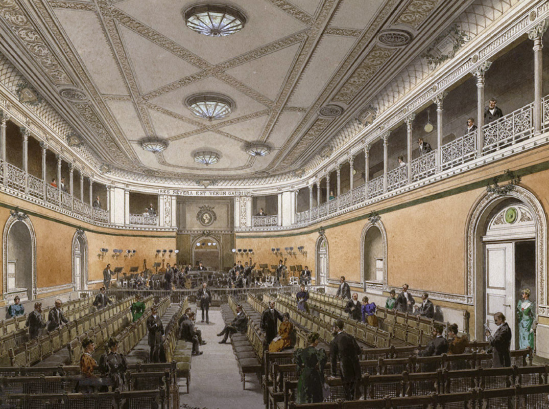 Blick in den Konzertsaal des Alten Gewandhauses mit einigen Musikern und Konzertbesuchern, Aquarell über Feder